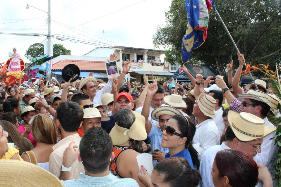 Grupo de santeños celebrando el festival de la mejorana.